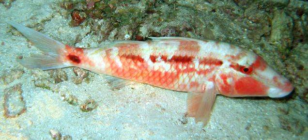 Parupeneus sp. (probably Parupeneus barberinus)